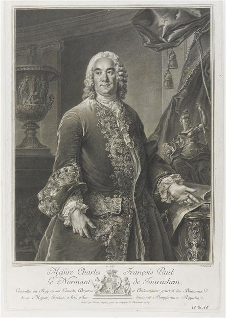 Gravure d'après le portrait par Tocqué (Versailles, Musée national du château).